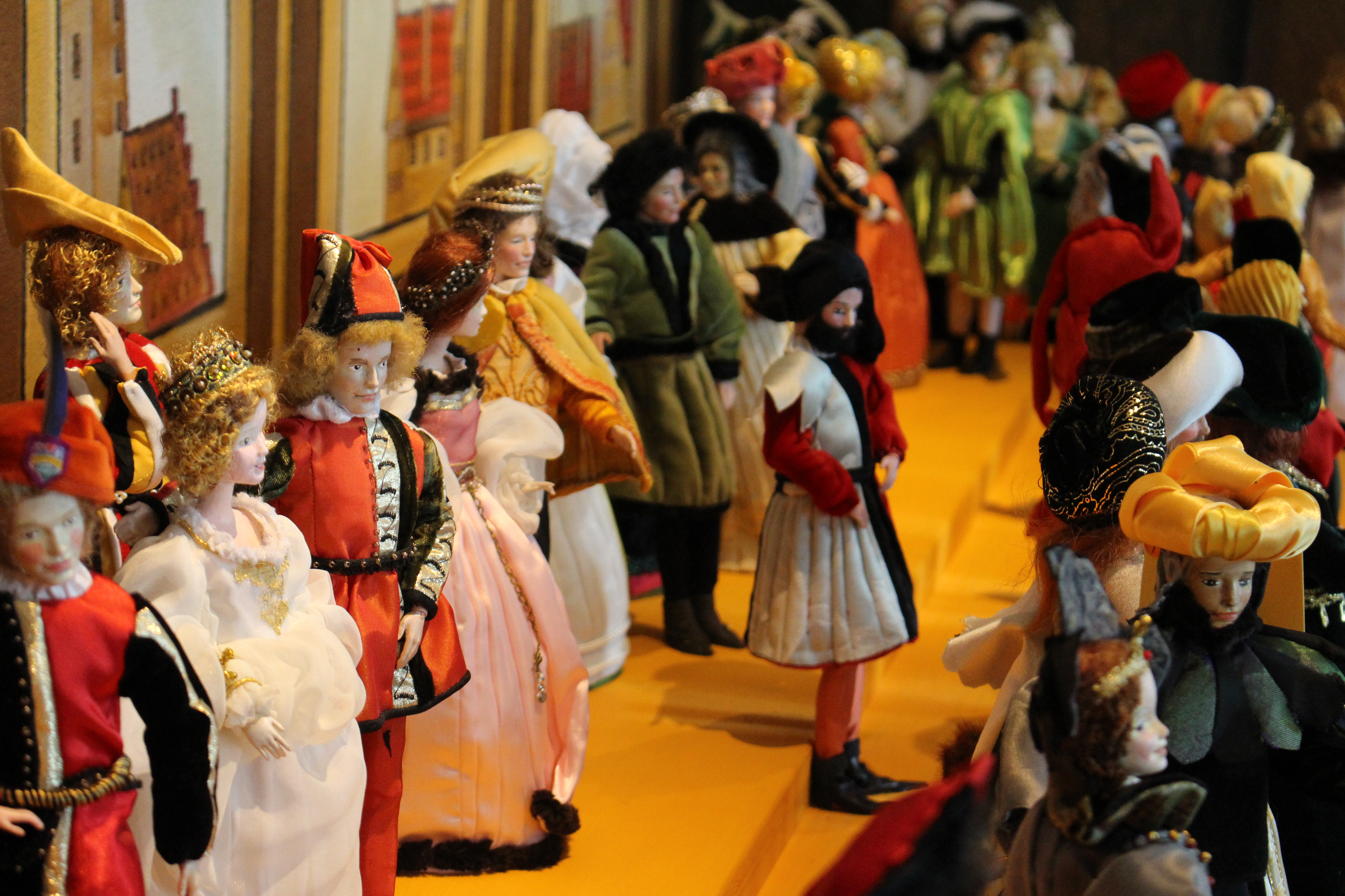 Die Ausstellung "Augsburger Geschlechtertanz" wurde von Ilse Wolf gefertigt. Urheberrecht bei Ilse Wolf. Bilddatei von Katja Morrison The Exhibition "Augsburger Geschlechtertanz" has been made by Ilse Wolf, all rights reserved. Picture by Katja Morrison